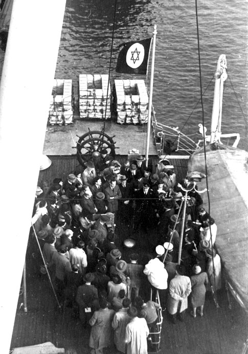 Negba Ship